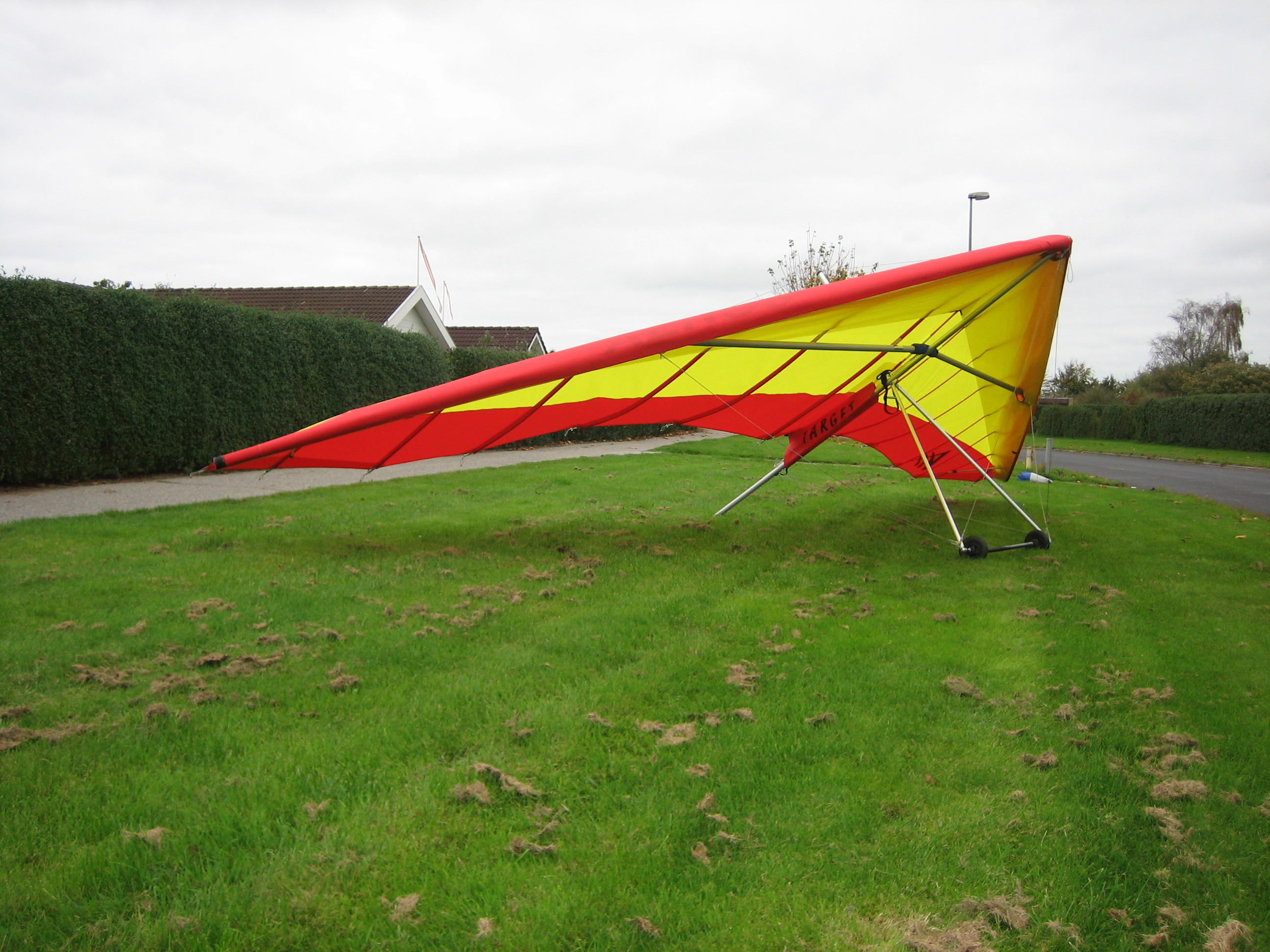 Single surface hang glider.